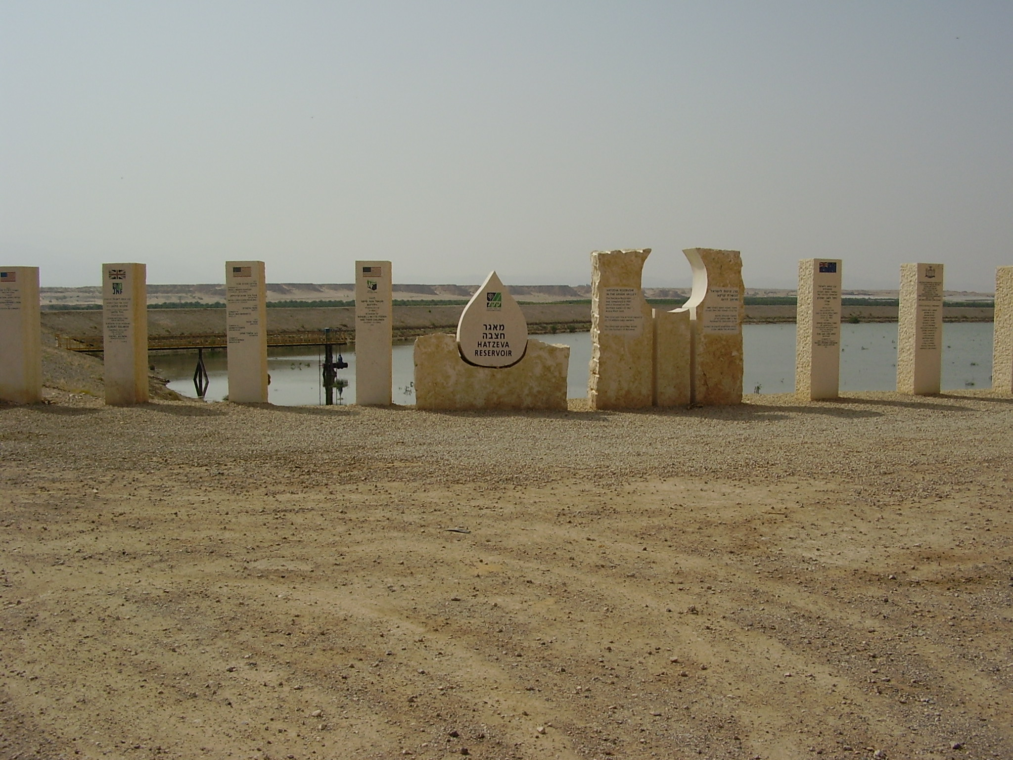 hazeva reservoir in the negev, israel